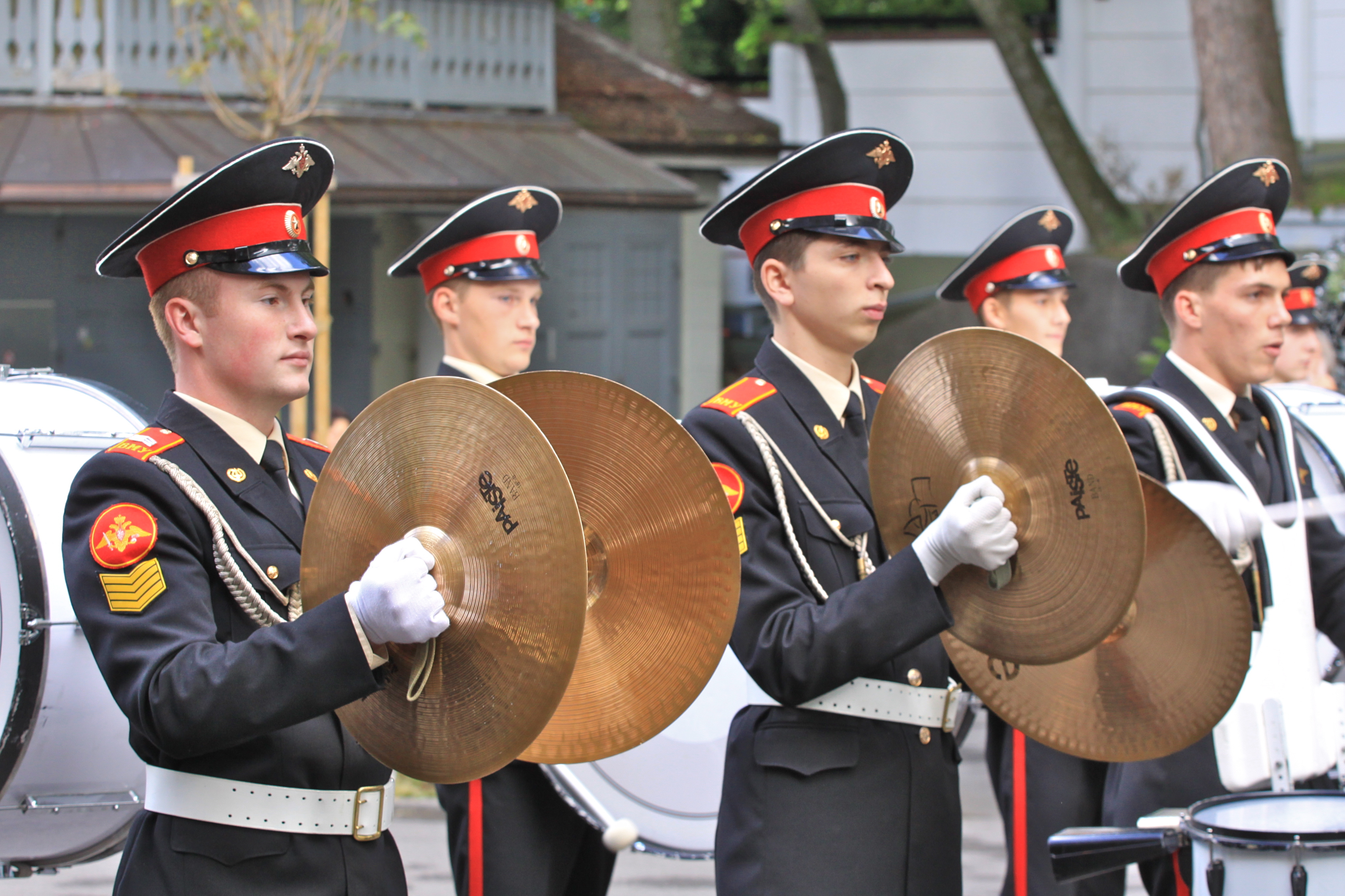 Sie dürfen das Foto mit Nennung des Autors honorarfrei vervielfältigen, verbreiten und öffentlich zugänglich machen. Foto: Jürg Vollmer / Infos